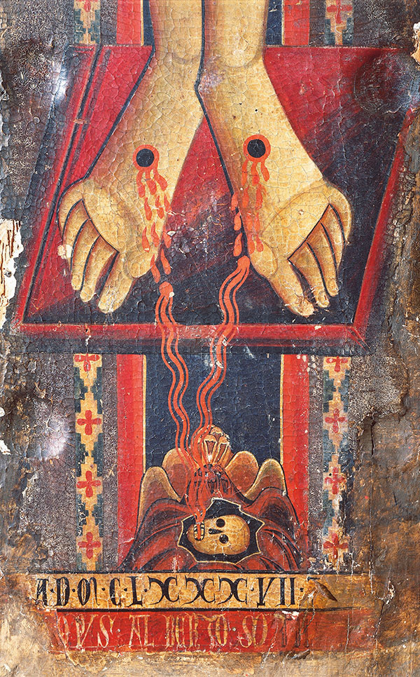 Crucifix de Spolète, attribué à Alberto Sotio, cathedrale de Spolète